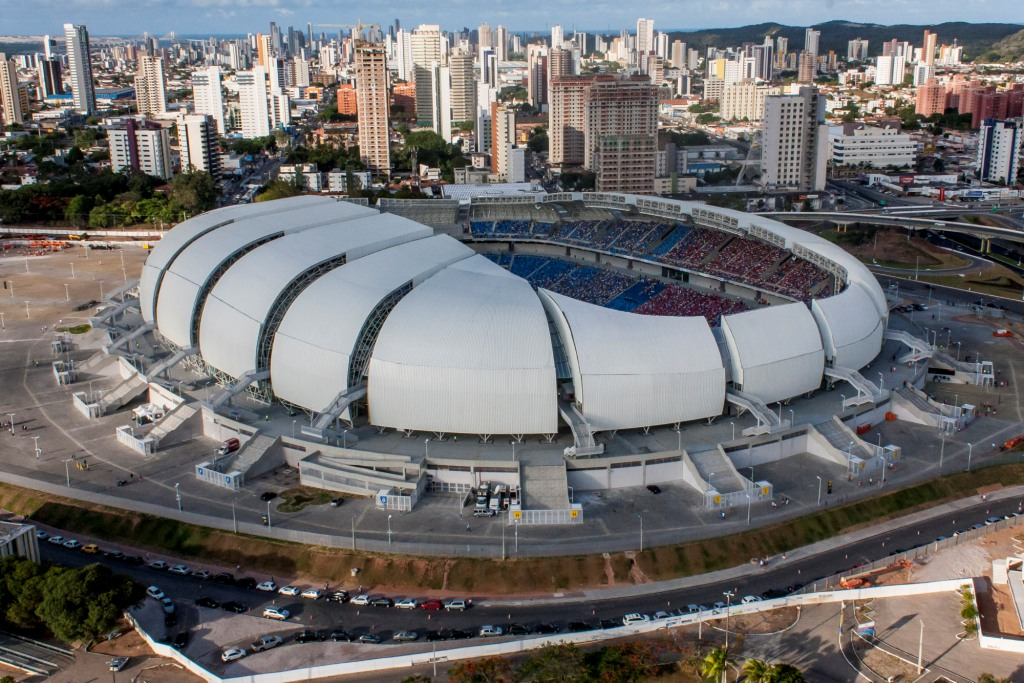 Estádio Arena das Dunas, em Natal, Brasil.